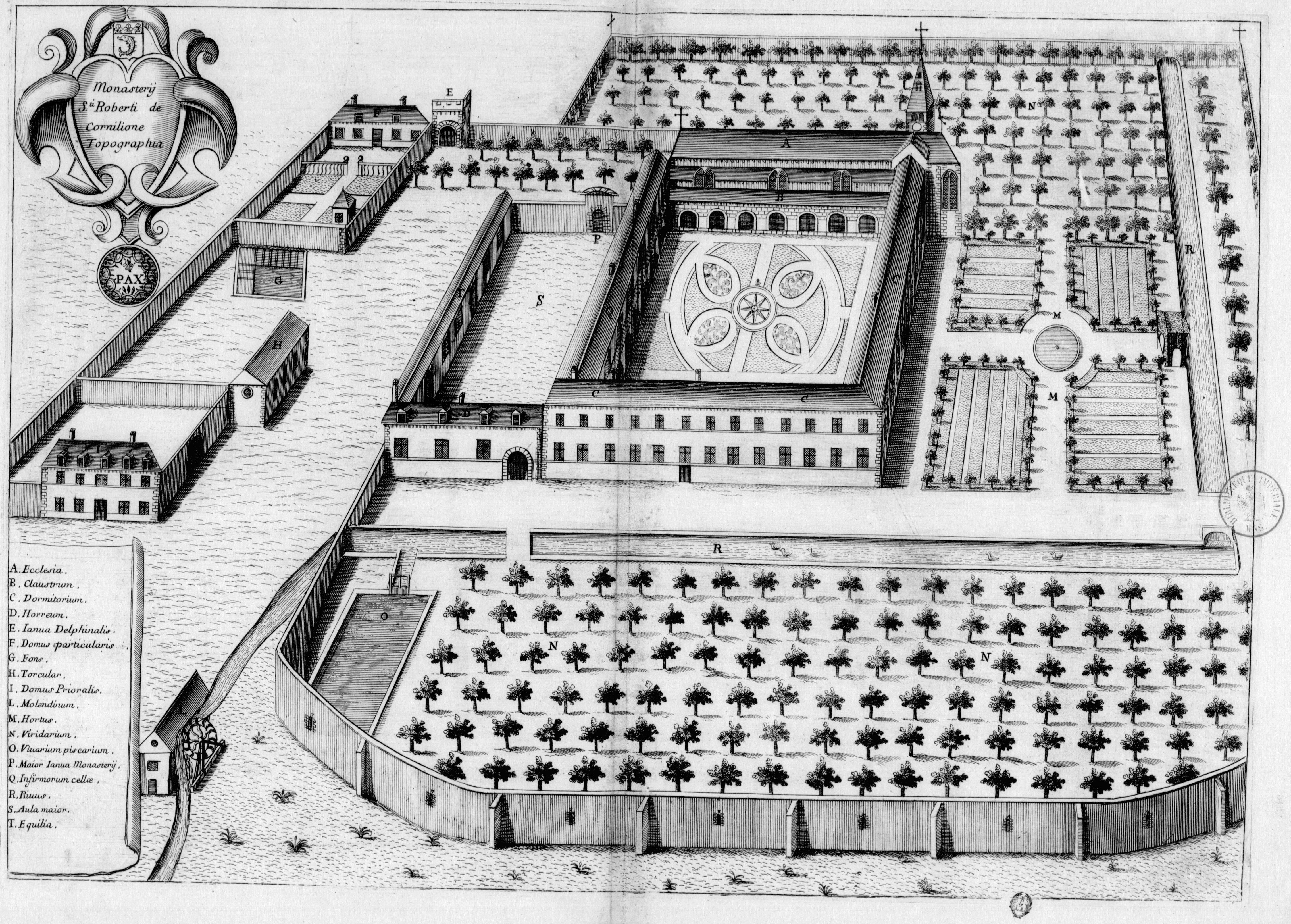 Planche gravée du 17ème siècle représentant le monastère Saint-Robert-de-Cornillon, en France, dans le livre Monasticon Gallicanum.